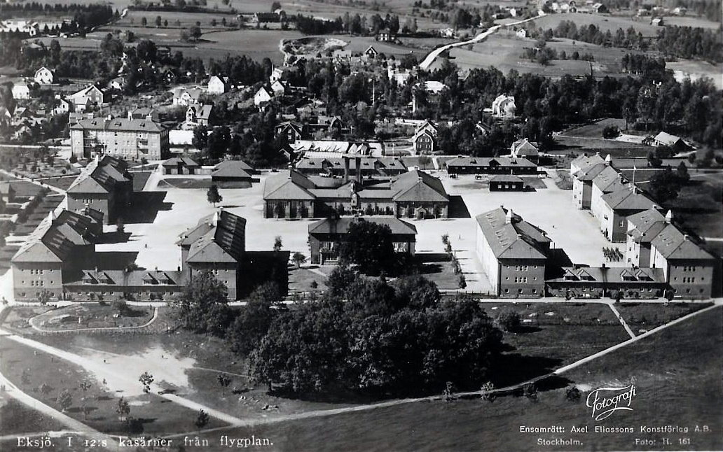 Jönköpings-Kalmar regementes kasern i Eksjö, uppförda efter Kasernbyggnadsnämndens andra serie typetablissement för infanteriet. Kanslihuset fick i motsats till övriga kaserner i samma serie, endast tre våningar genom att våningen för officersmässen uteslöts.